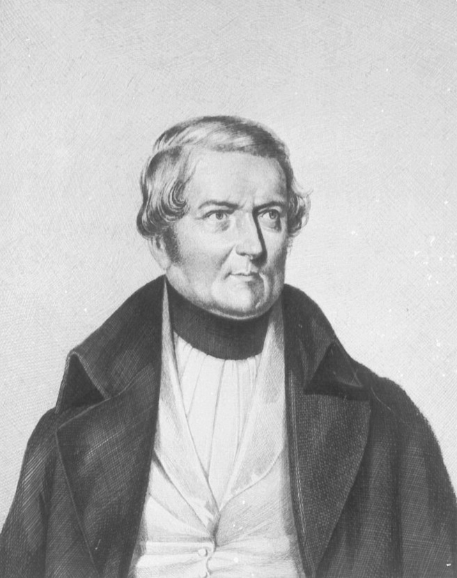 Dietrich Christoph von Rommel (1781-1859) (Federzeichnung von F. Justi)